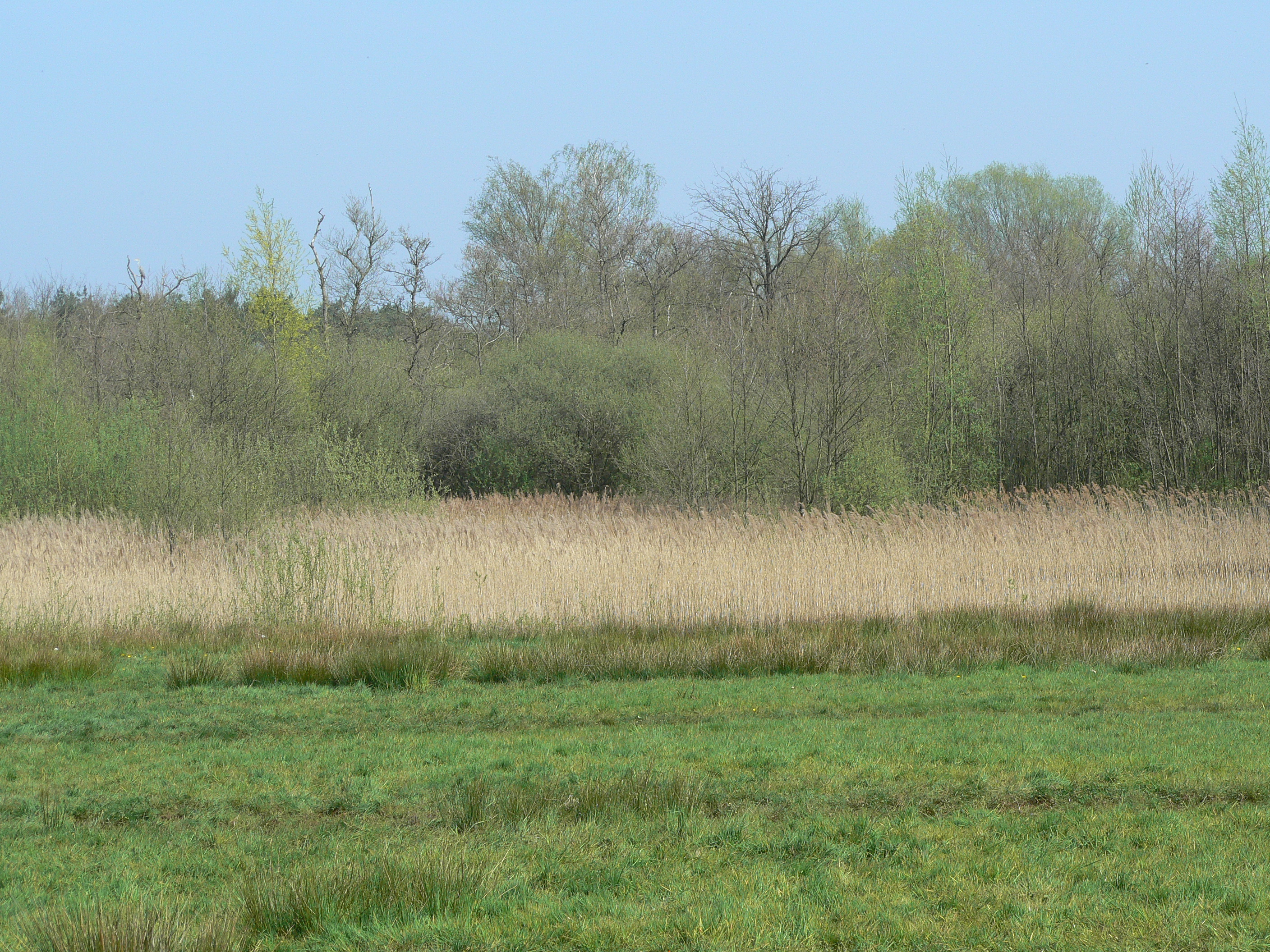 schrieken